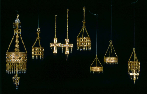 Tesoro de Guarrazar (Conjunto) (Reino hispanovisigodo). Número de inventario: Conjunto 594.